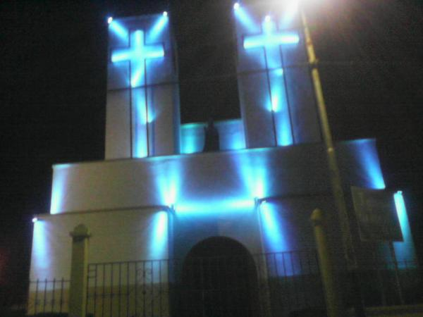 Iglesia San Nicolas De Bari